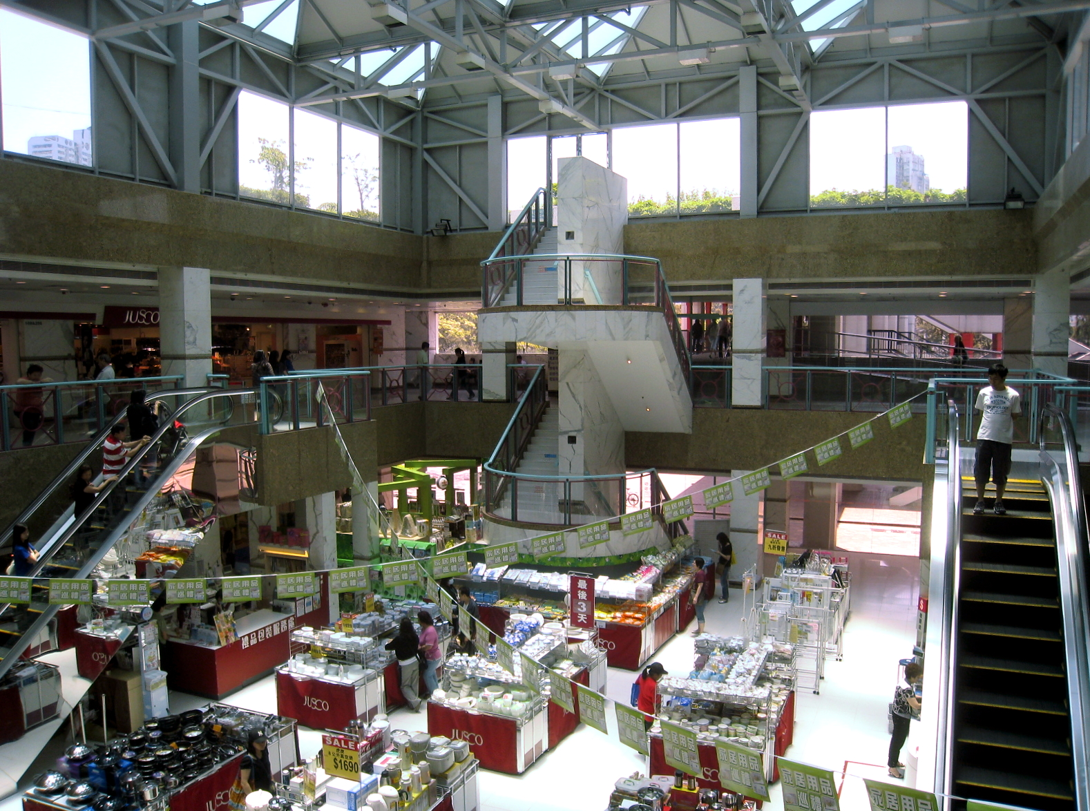 Tai Po Mega Mall Zone B Void 大埔超級城 B 區